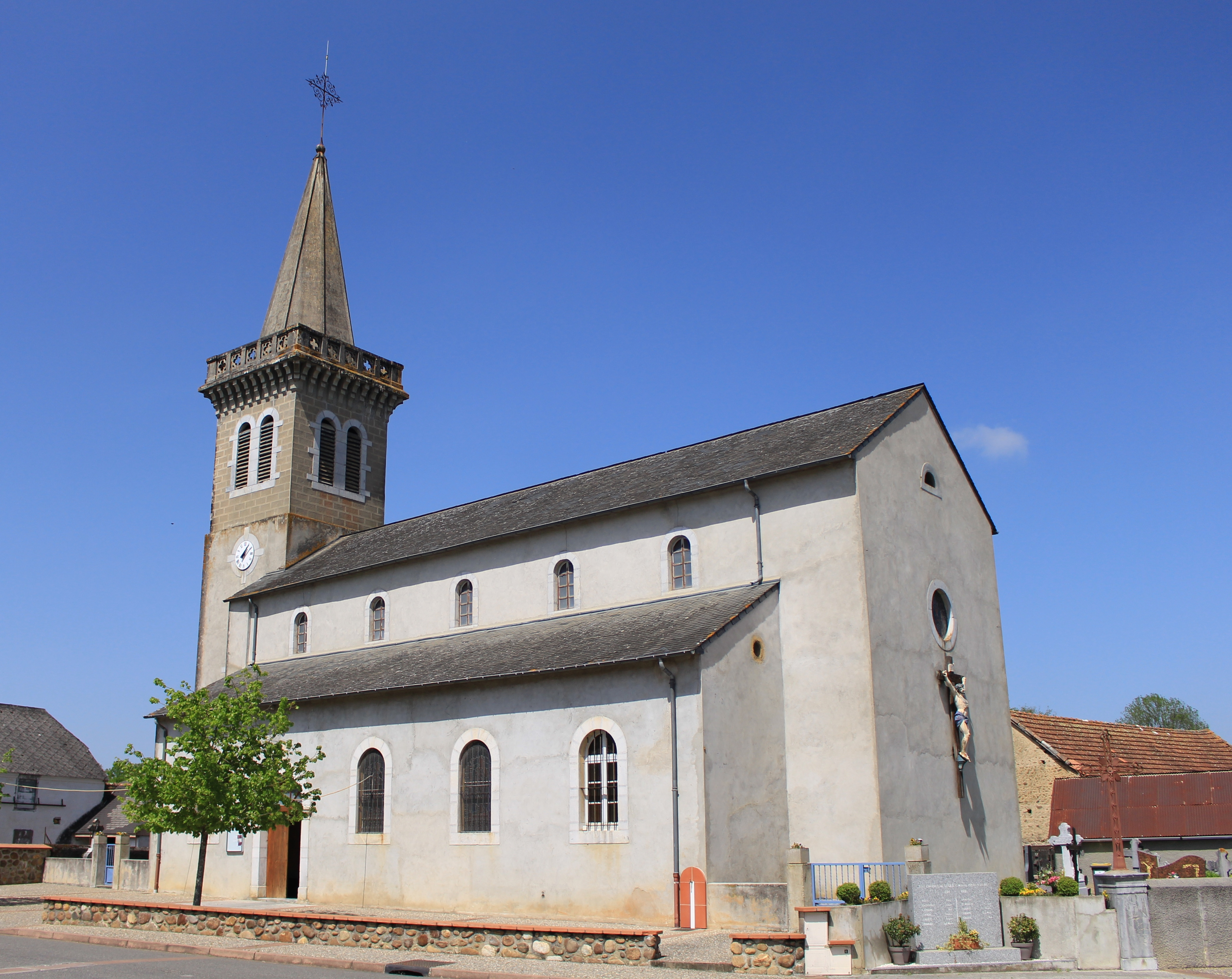 Église Saint-Laurent de Luquet (Hautes-Pyrénées)